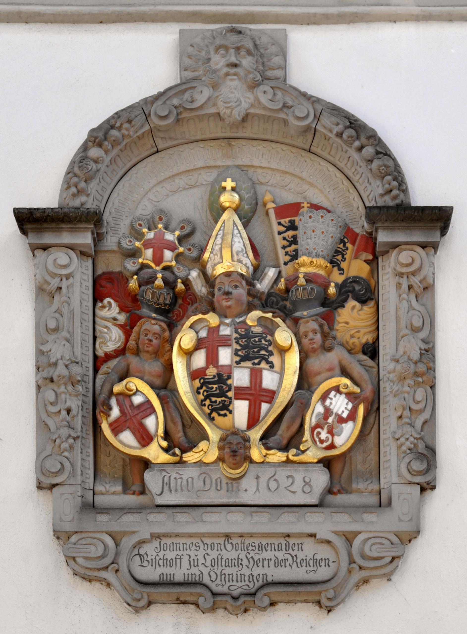 Meersburg, Wappenrelief des Konstanzer Bischofs Johann von Waldburg an einem Haus in der Steigstraße, Details siehe Website Dr. Bernhard Peter